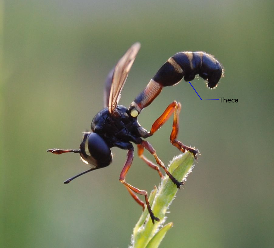 Theca on female Conopidae